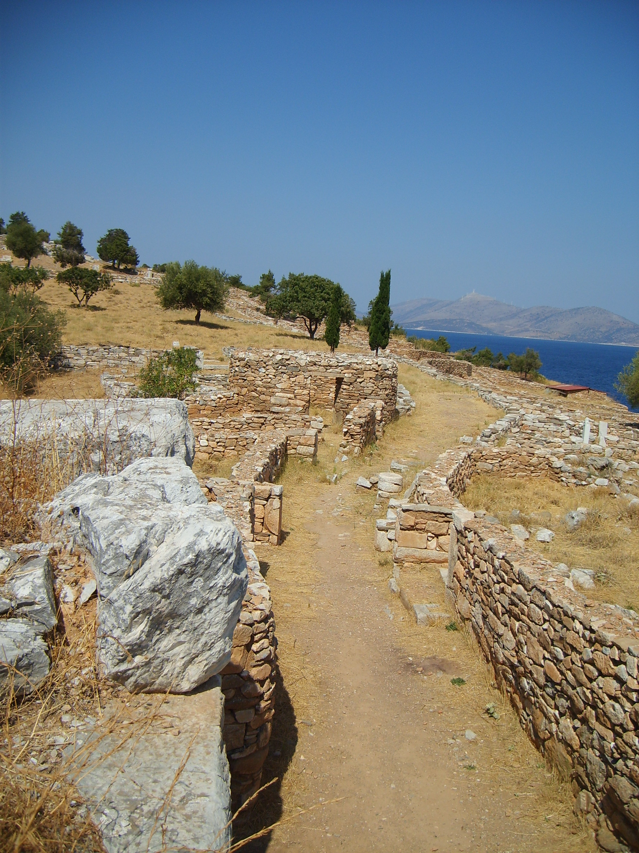 Ramnous (site archéologique - allée principale)